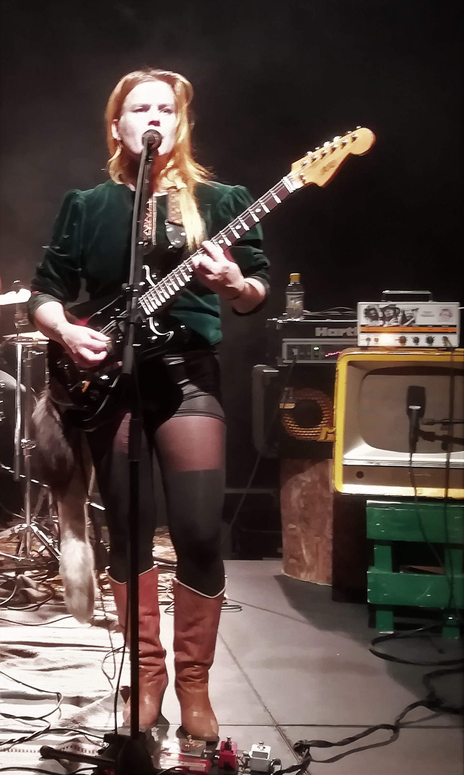 Mara Balls syksyllä 2018.